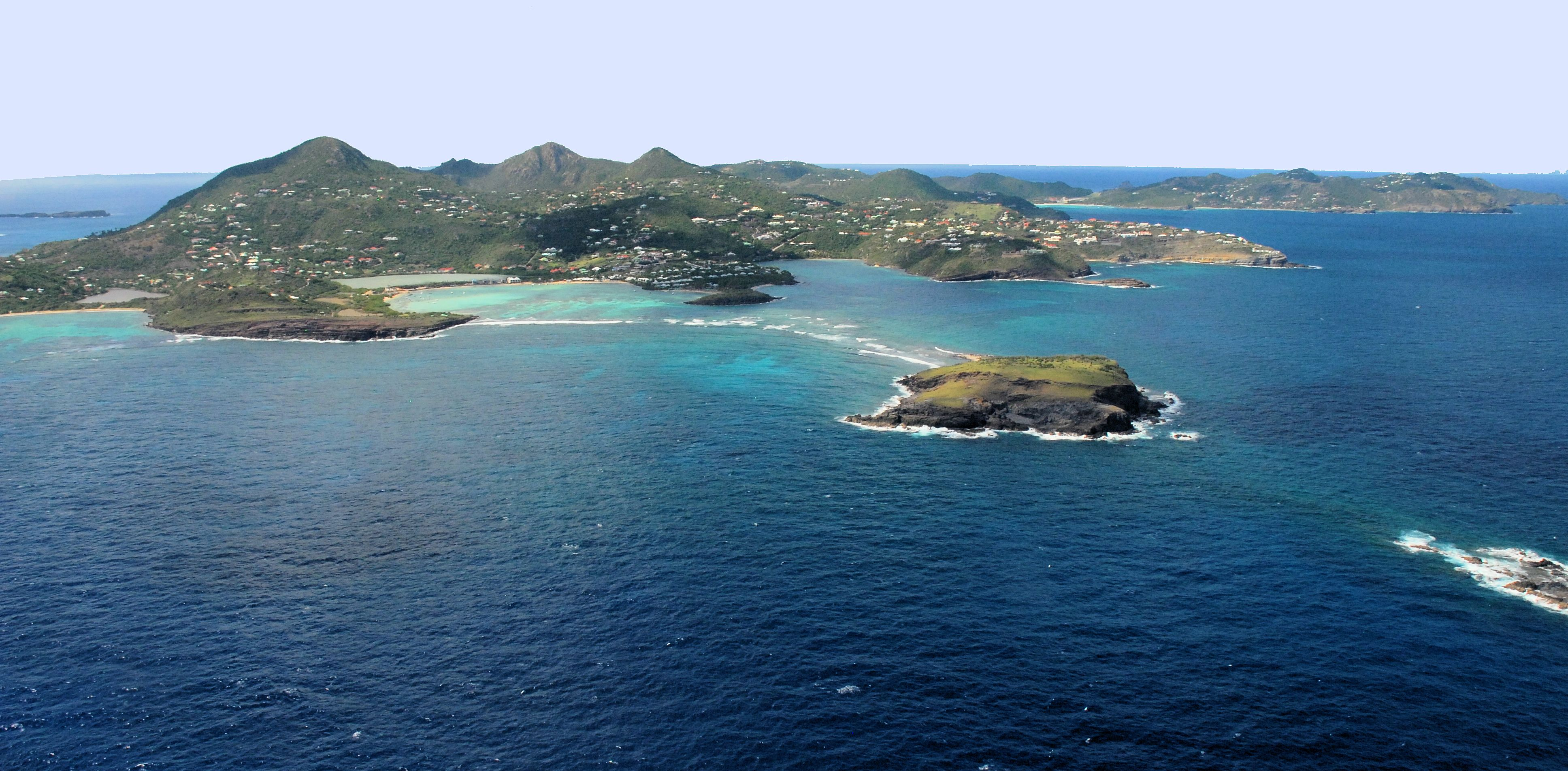 Saint Barth - Vue panoramique - Octobre 2009